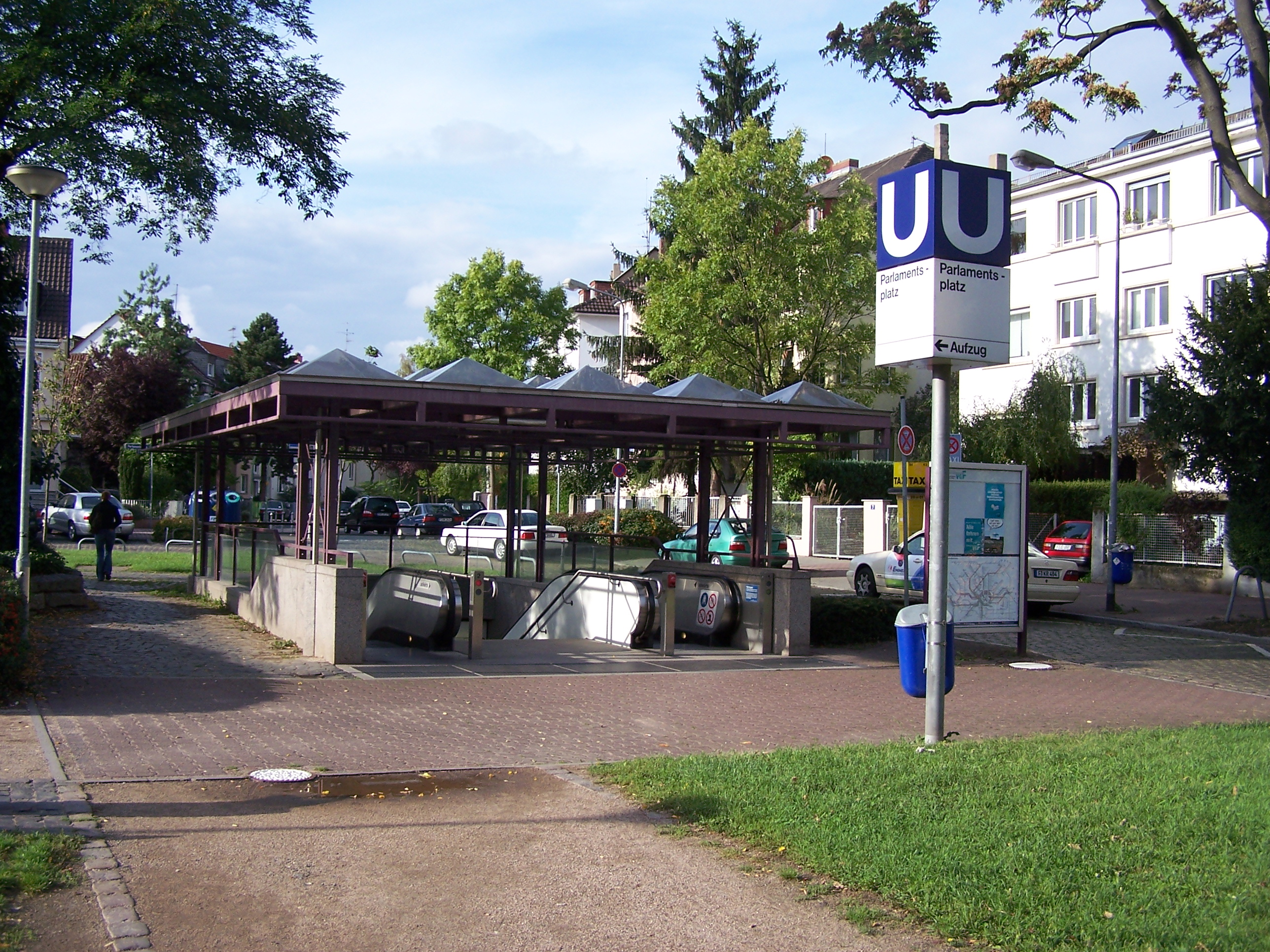 U-Bahn-Station Parlamentsplatz im Frankfurter Ostend